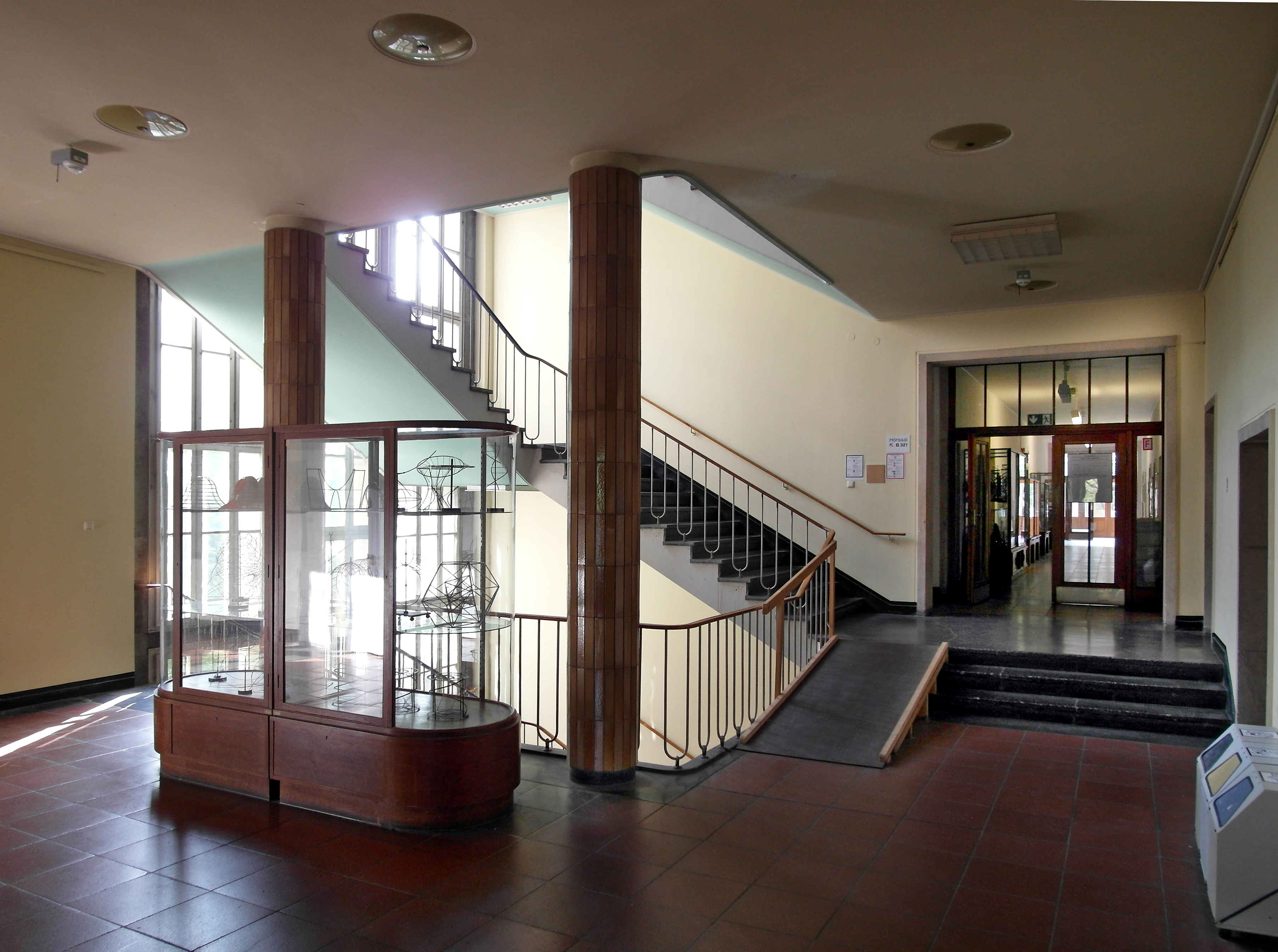 23.09.2017 01067 Dresden-Räcknitz: Willersbau der TU Dresden, Flügel B, Treppenhaus im Erdgeschoß. Zellescher Weg (GMP: 51.028811,13.733962). [SAM2060.JPG]20170923220DR.JPG(c)Blobelt